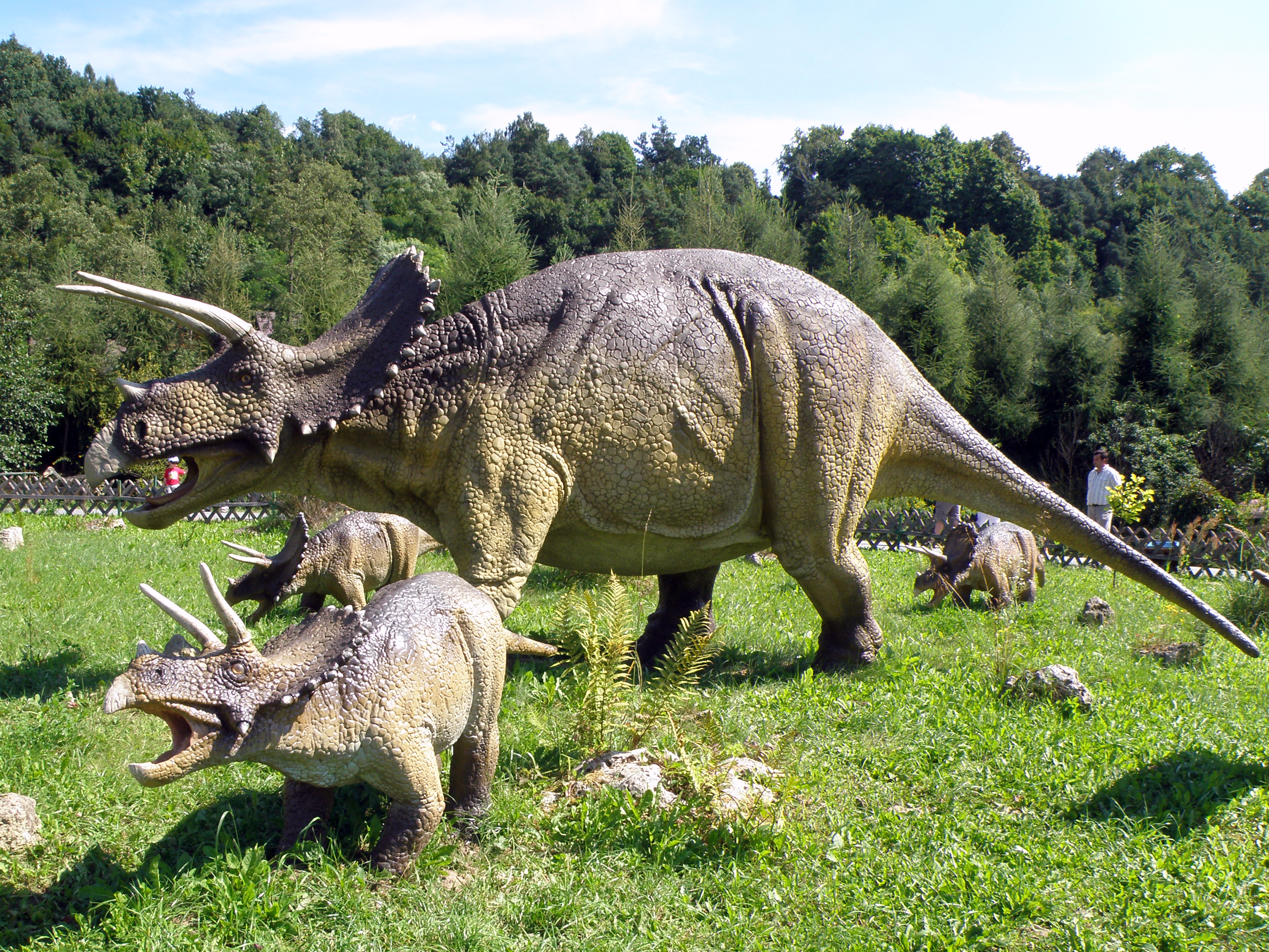 JuraPark Bałtów - Park Dinozaurów - Triceratops